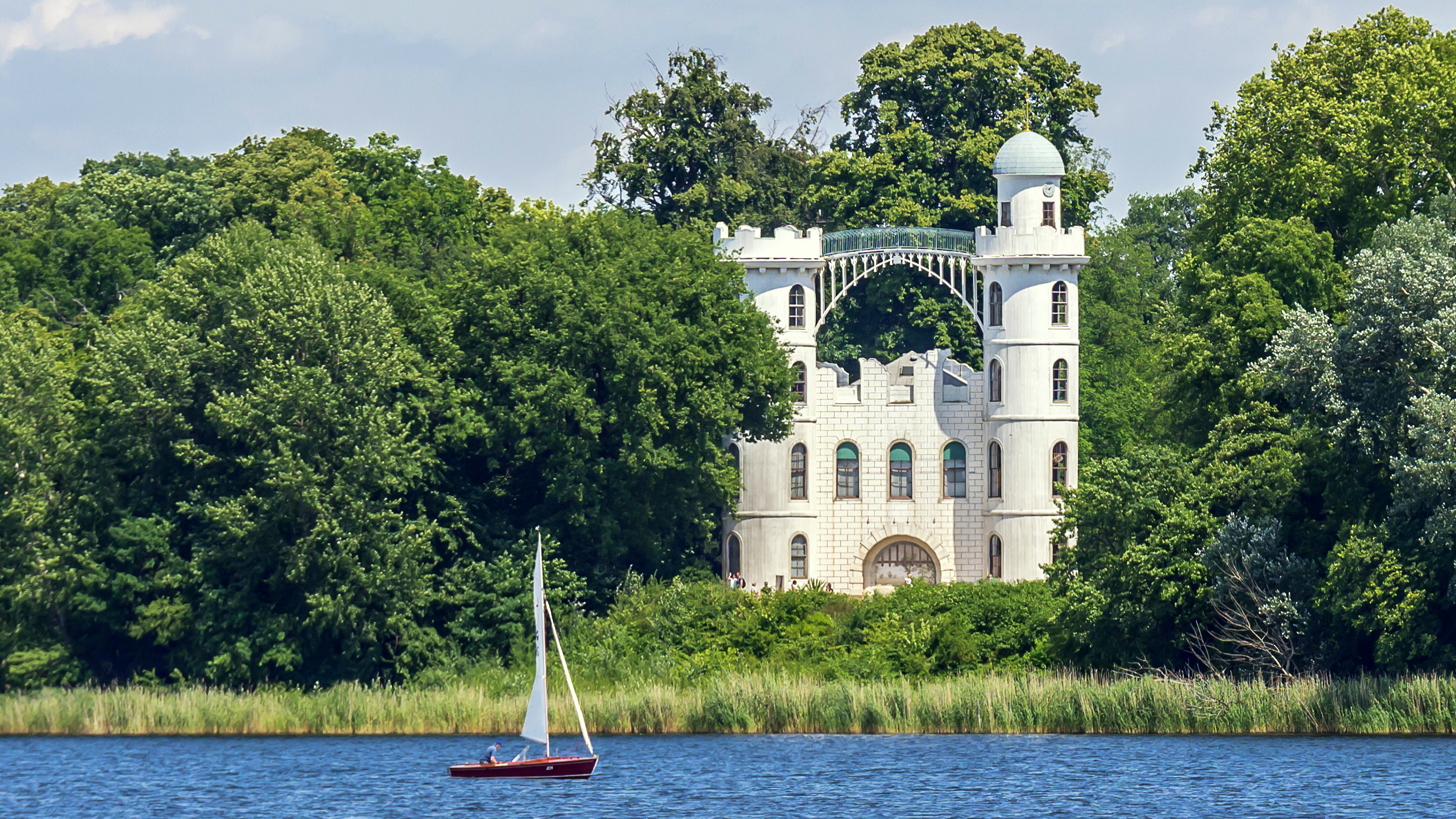 Potsdam Schloß Pfaueninsel